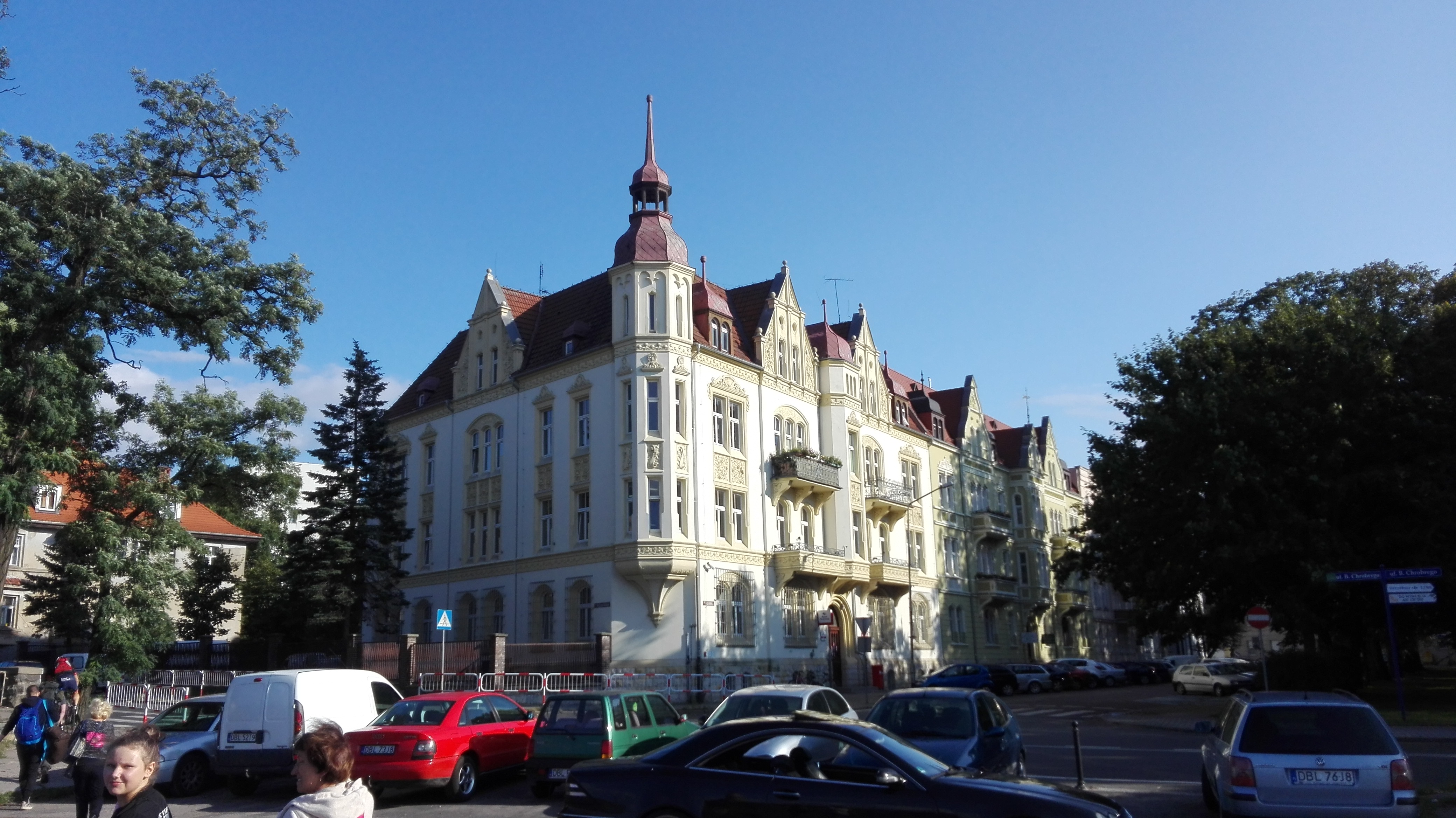 Urząd Pocztowy Bolesławiec Kaszubska